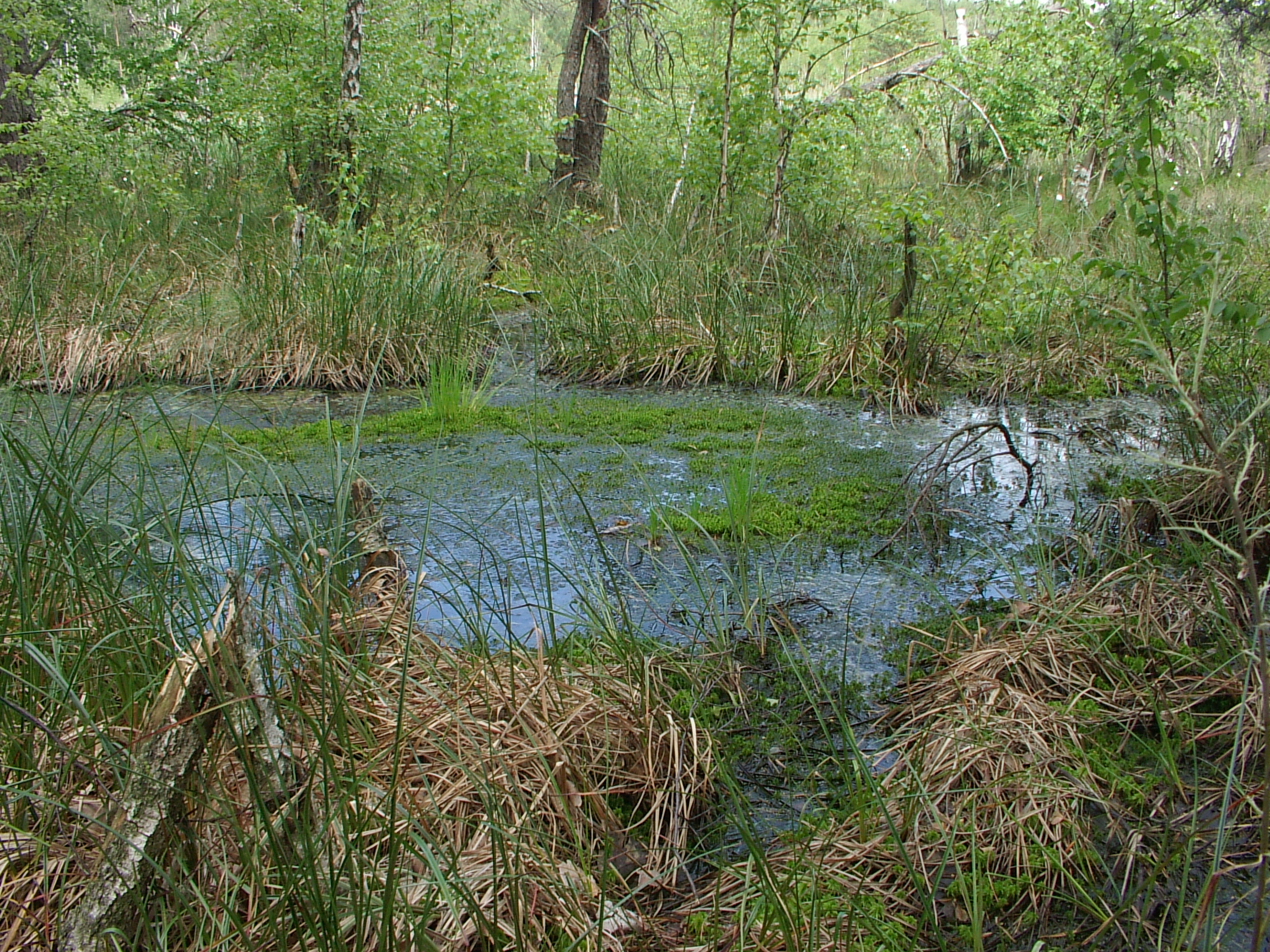 Rezerwat przyrody Torfowisko Rąbień Nature reserve Rąbień Peat Bog